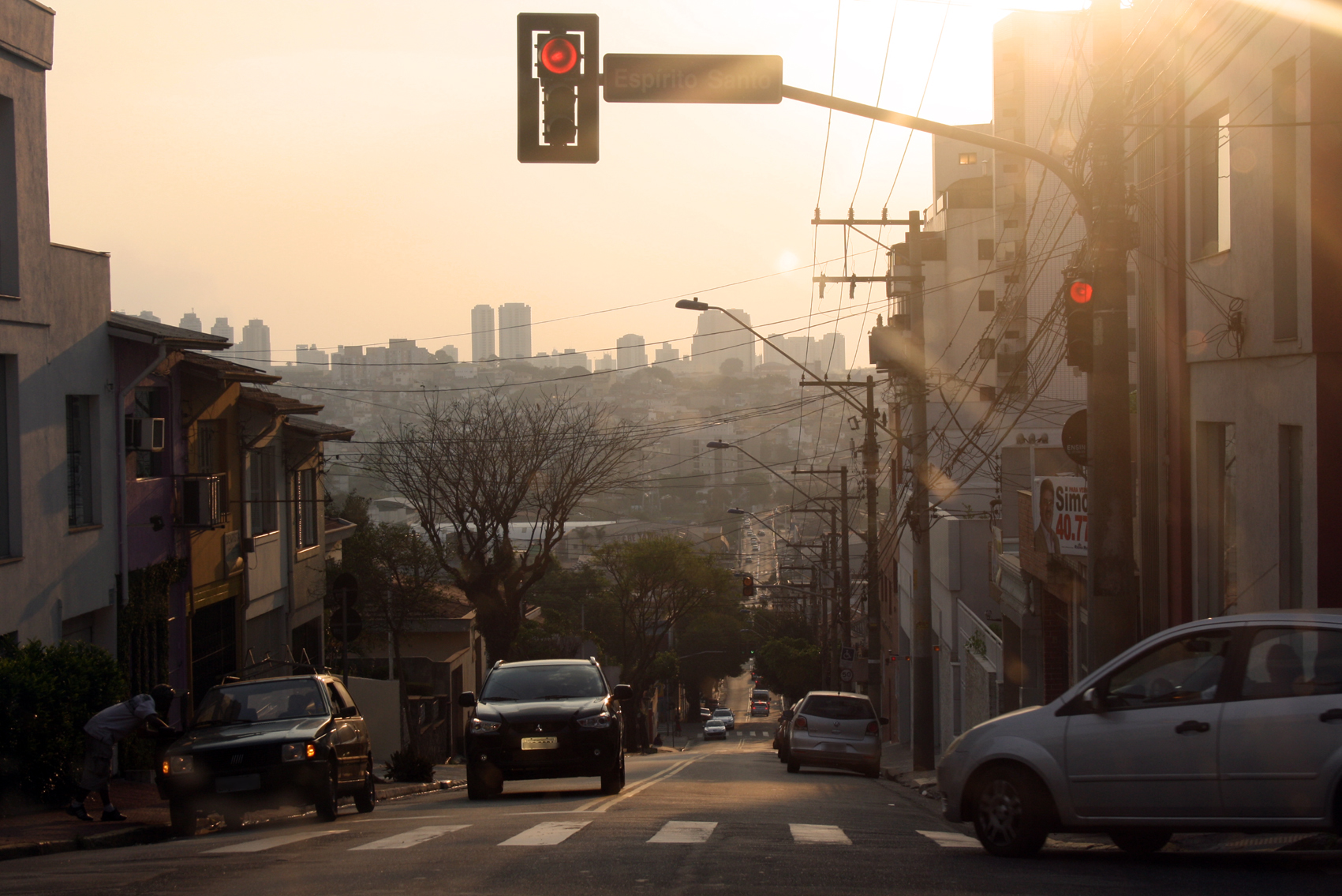 São Caetano do Sul - 09/2012